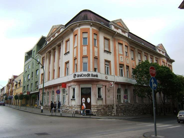 Banképület Kaposváron